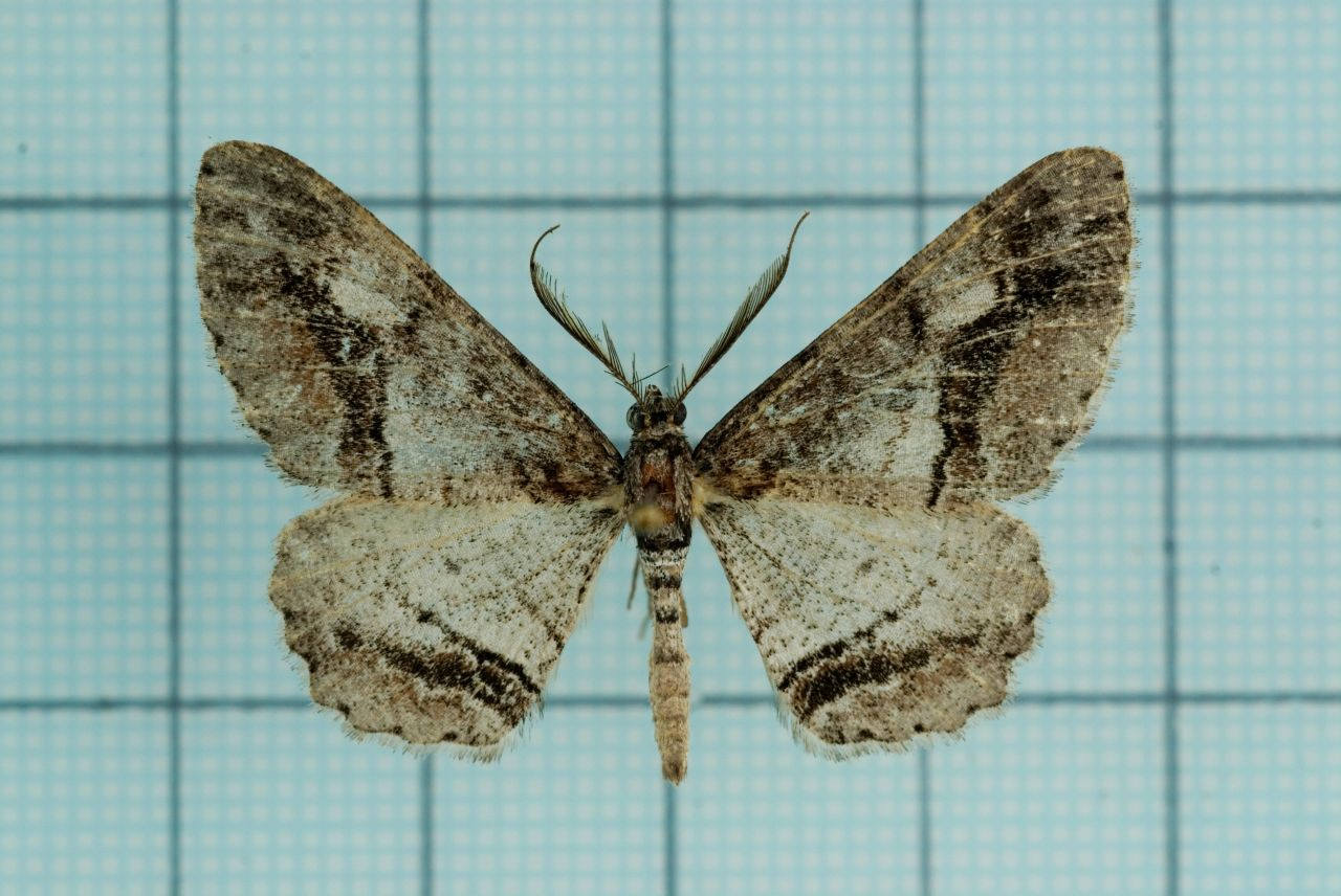 Rikiosatoa fucataria (Wileman, 1911) 佐藤大尺蛾 鞍1:P.32,Pl.7-4 male